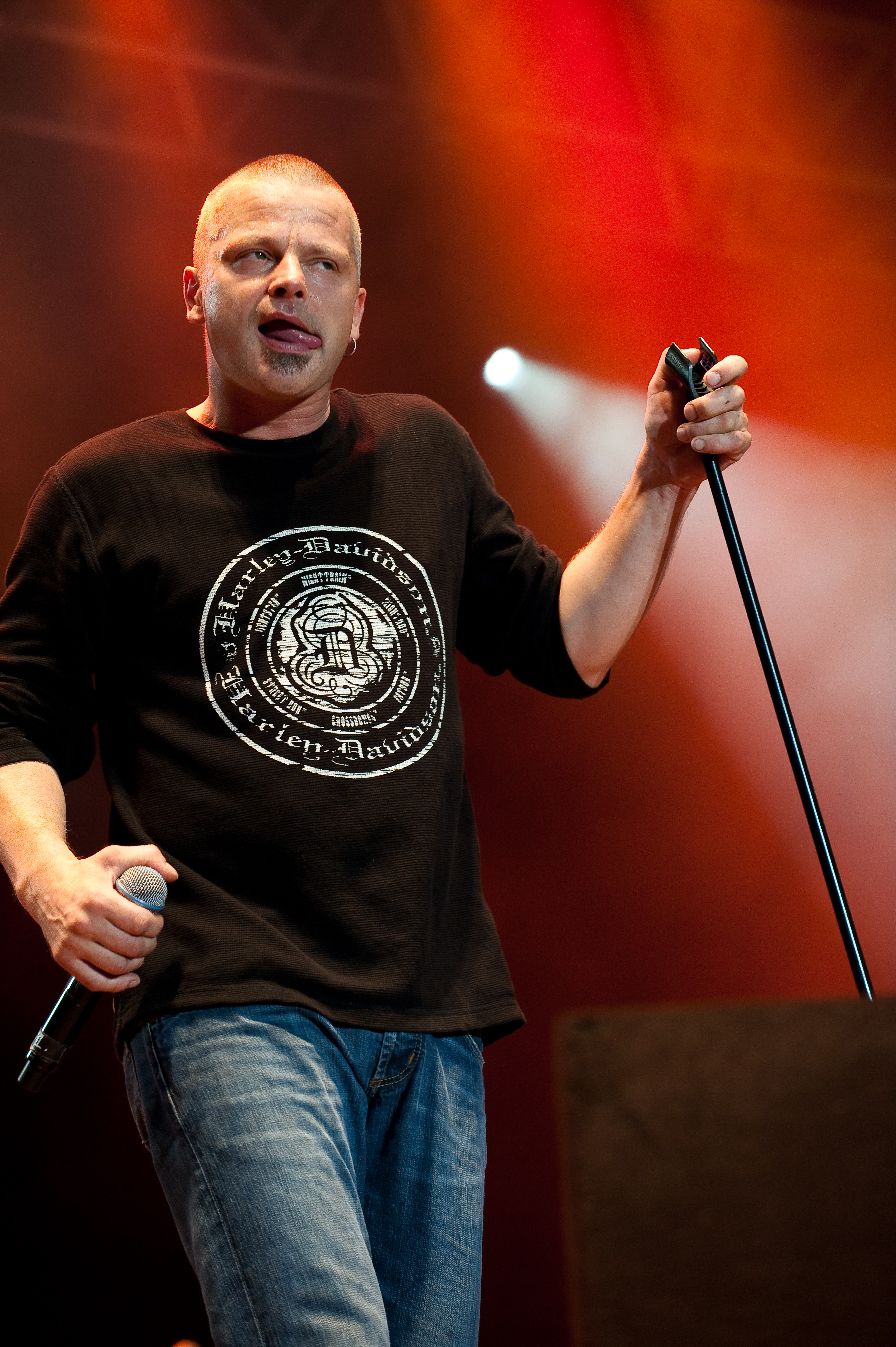 DumDum Boys